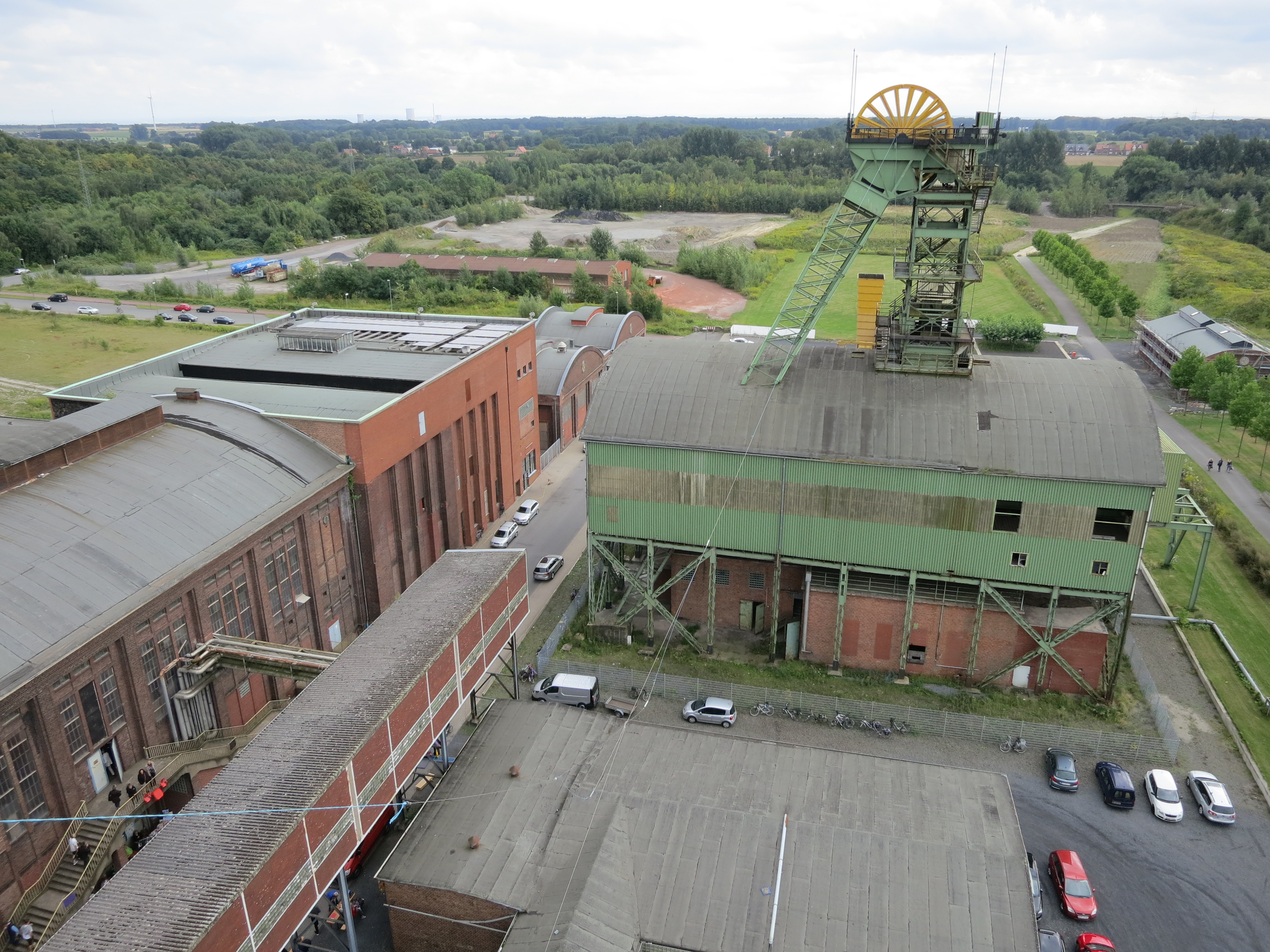 Blick vom Förderturm der Zeche Westfalen in Ahlen (Westfalen), Deutschland